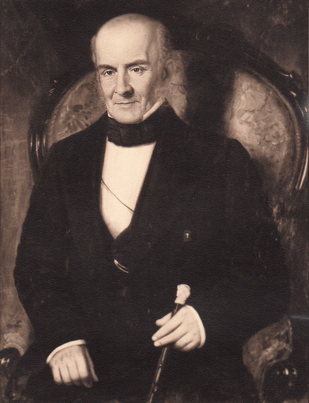 Pedro Nolasco Vergara Albano retratado por Raymond Monvoisin en el año 1859 en Santiago de Chile.